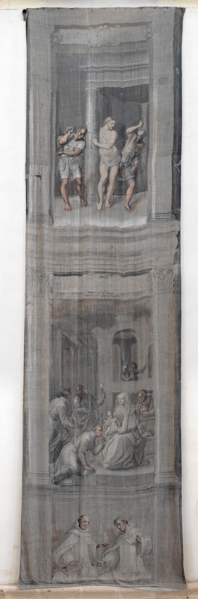 La obra representa, en su parte superior, la flagelación de Jesucristo, y en su parte inferior, el momento en que el Niño Jesús fue adorado por los tres Reyes magos.